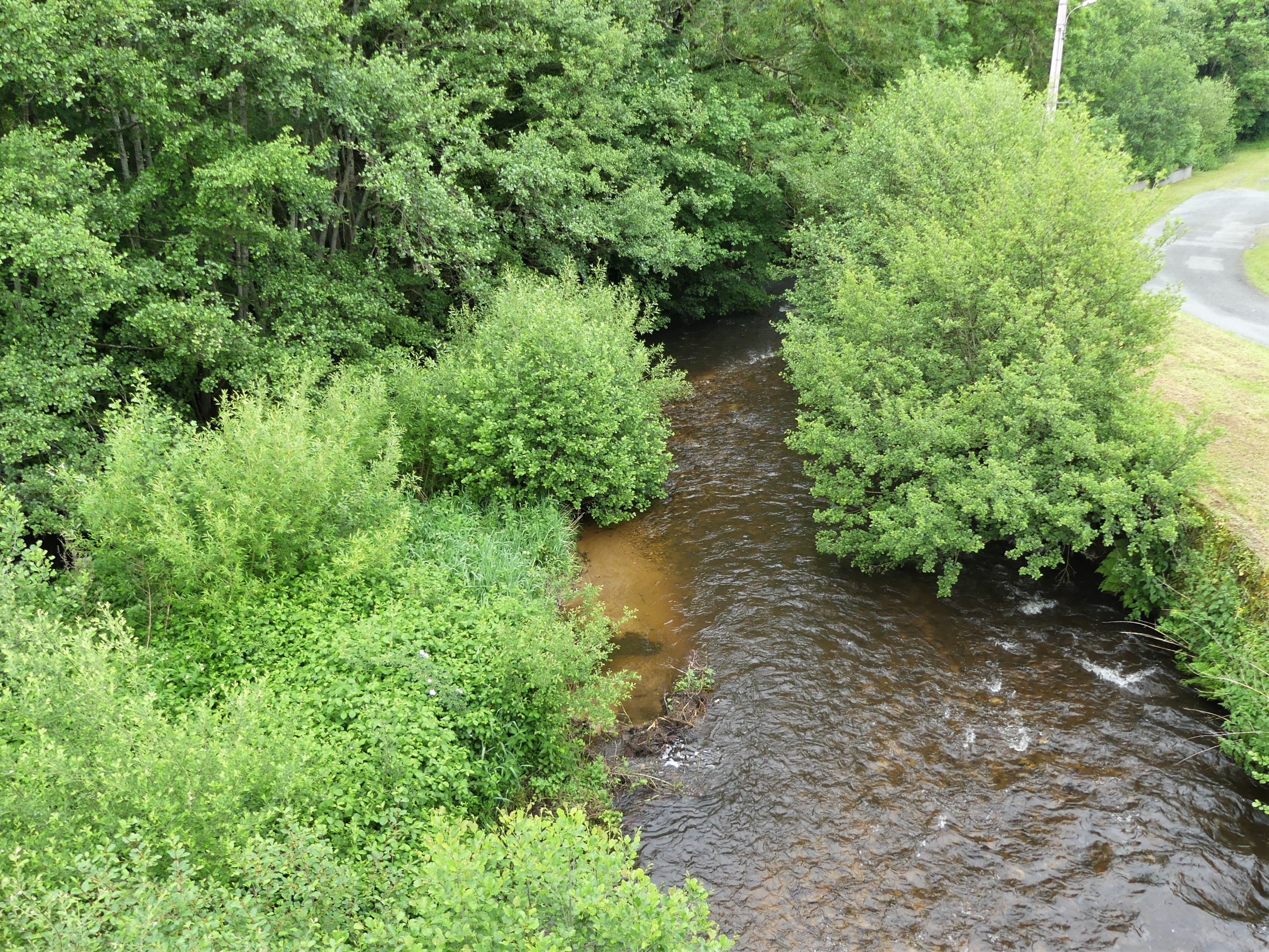 La Creuse au pont de la route départementale 10, lieu-dit le Pont des Malades, entre Saint-Quentin-la-Chabanne (à gauche) et Felletin (à droite), Creuse, France. Vue prise en direction de l'aval.